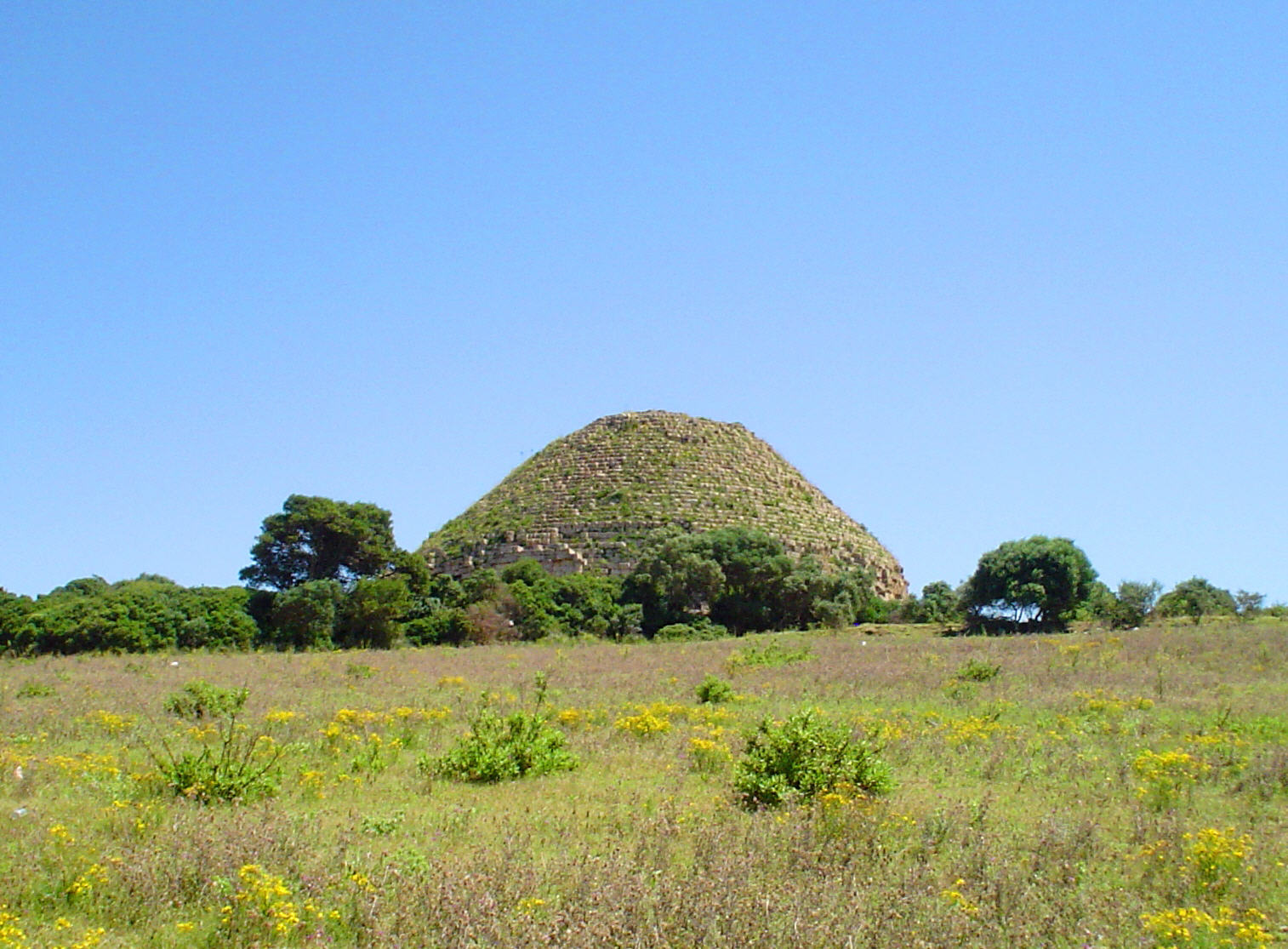 Tombeau de la chretienne الضريح الموريطاني